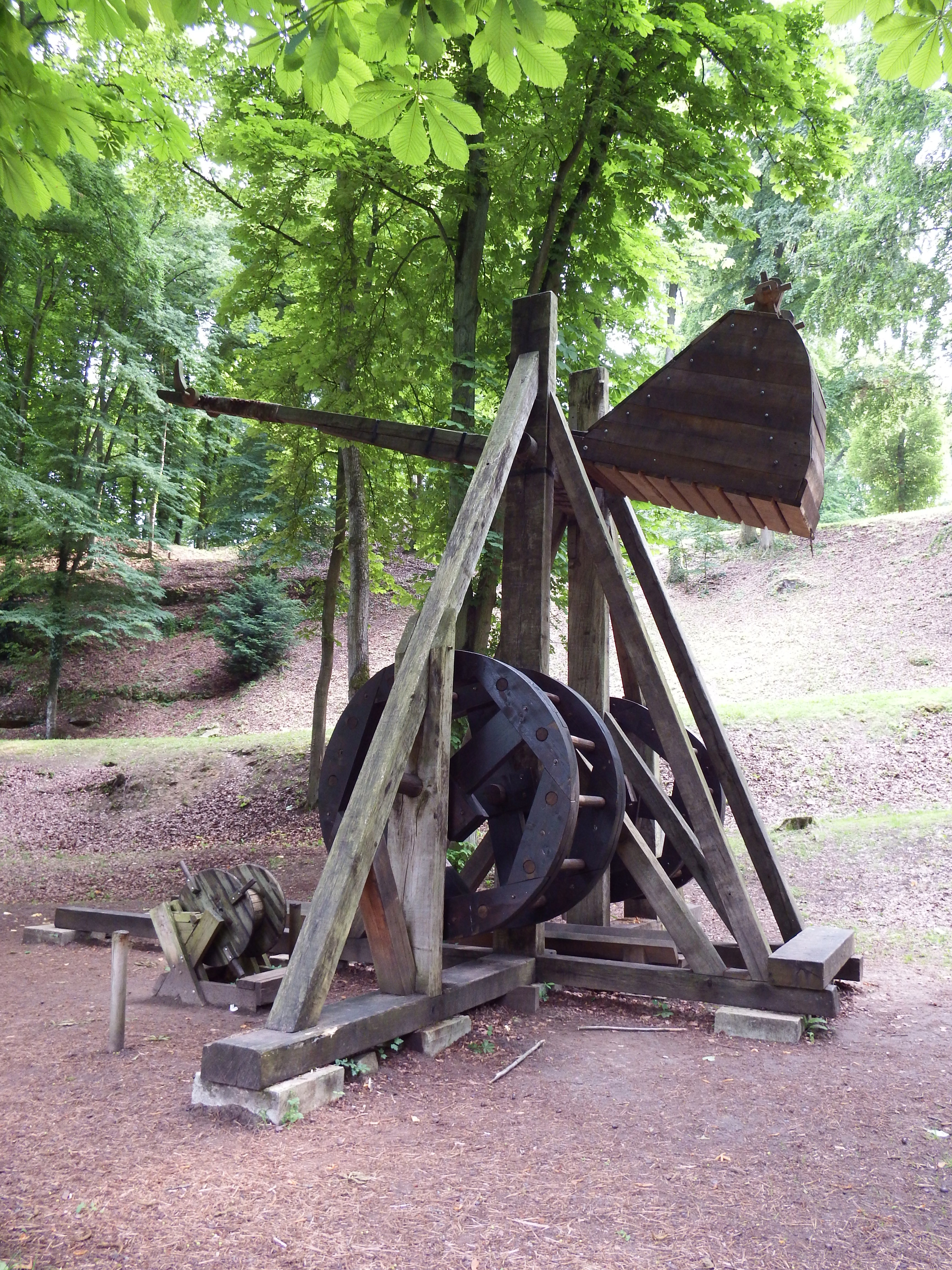 Catapulte visible dans le parc du château.